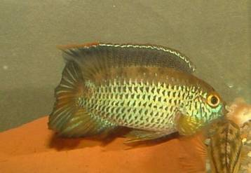 Nannacara anomala, adult male